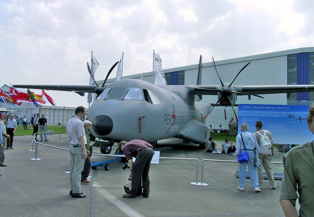 Eine CASA C-295 der EADS auf der ILA 2002.